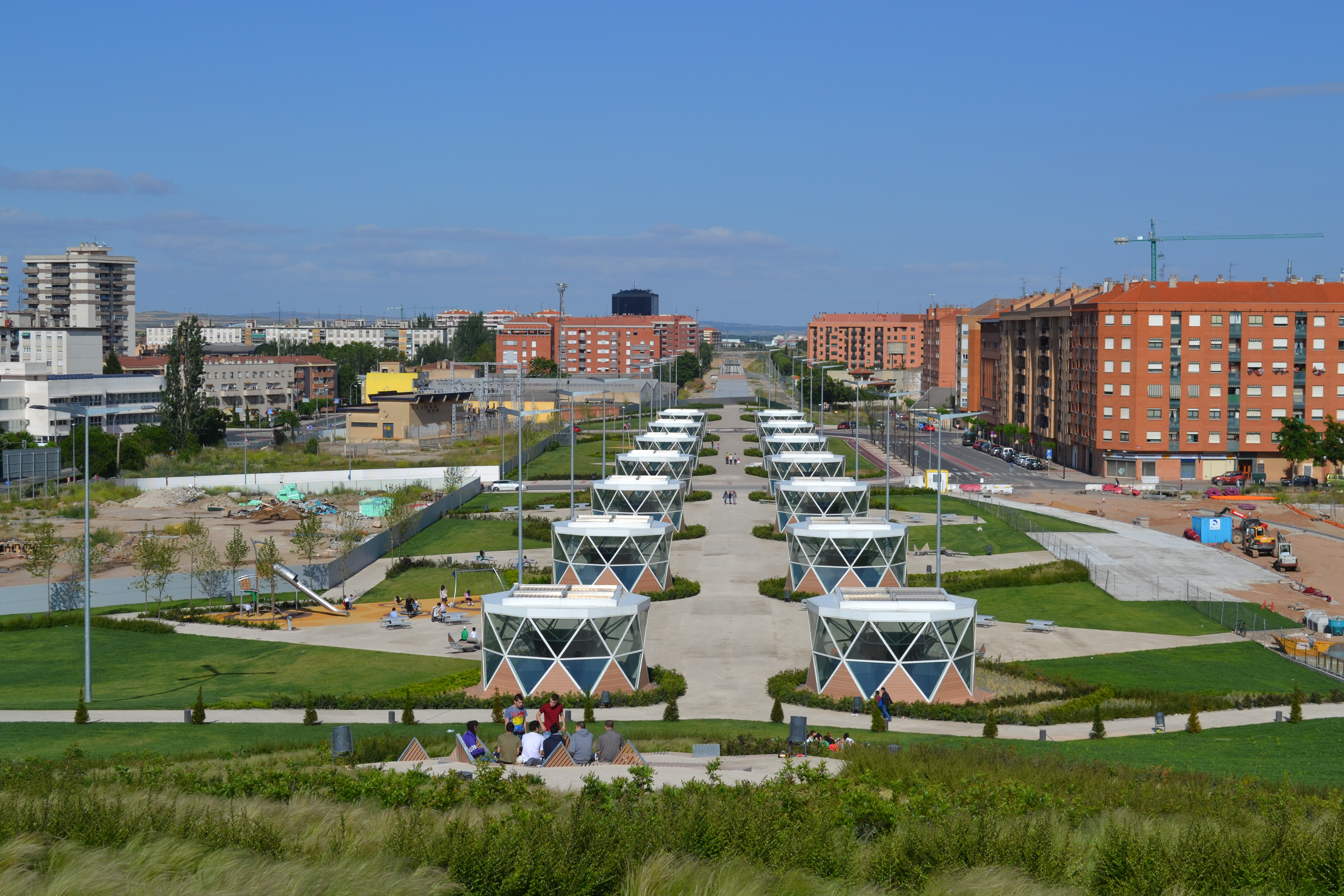 Parque de la estación de ferrocarril, Logroño